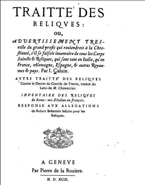 Титульный лист сочинения Жана Кальвина " Трактат о реликвиях" 1599 года издания